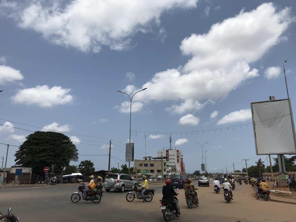 Abomey-Calavi centre-ville